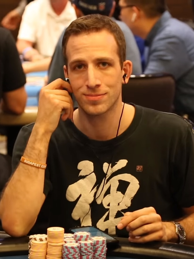 Benny Glaser bei der World Poker Tour Gardens